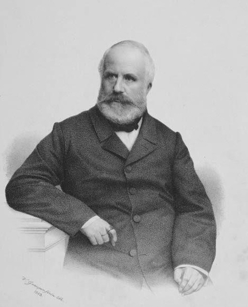 Karl Friedrich Georg von Ahlefeldt (1799-1862) geboren 8.Mai1799 auf Gut Saxtorf, gestorben 20.Oktober1862 auf Saxtorff. Dänischer Kammerherr.